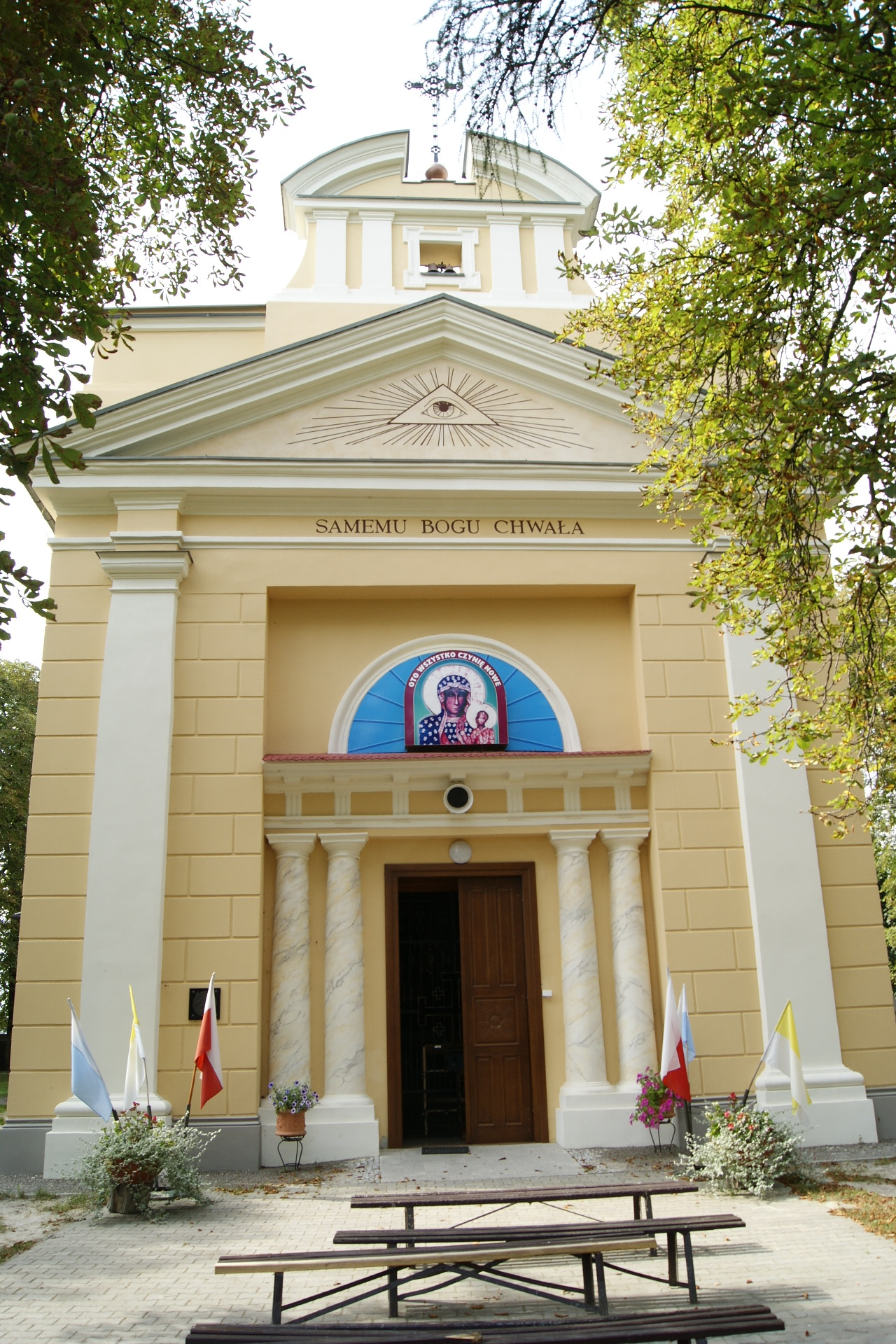 Dorohucza stara karczma